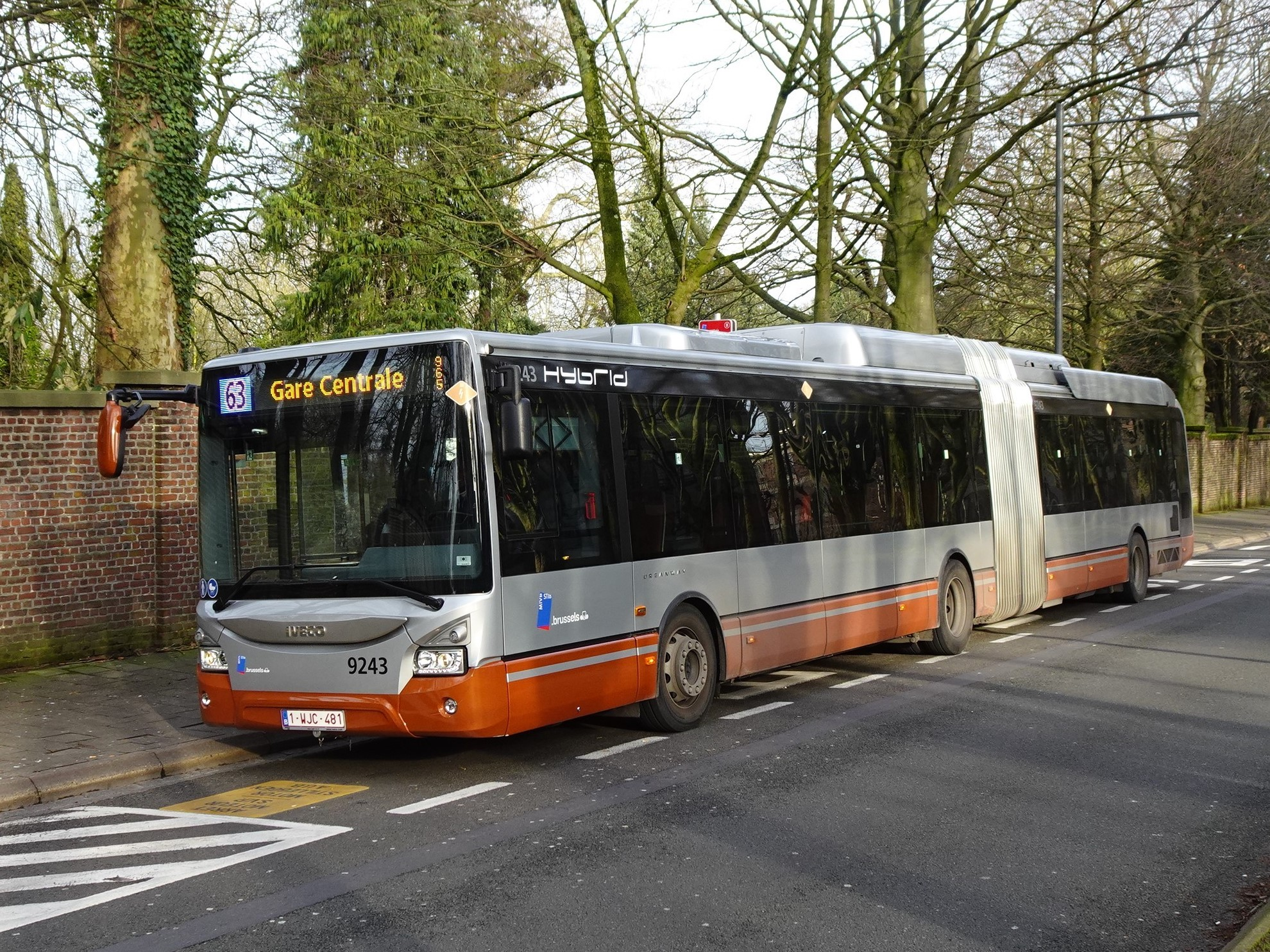 Nouvel autobus hybride Iveco Urbanway 18 au terminus du Cimetière de Bruxelles.